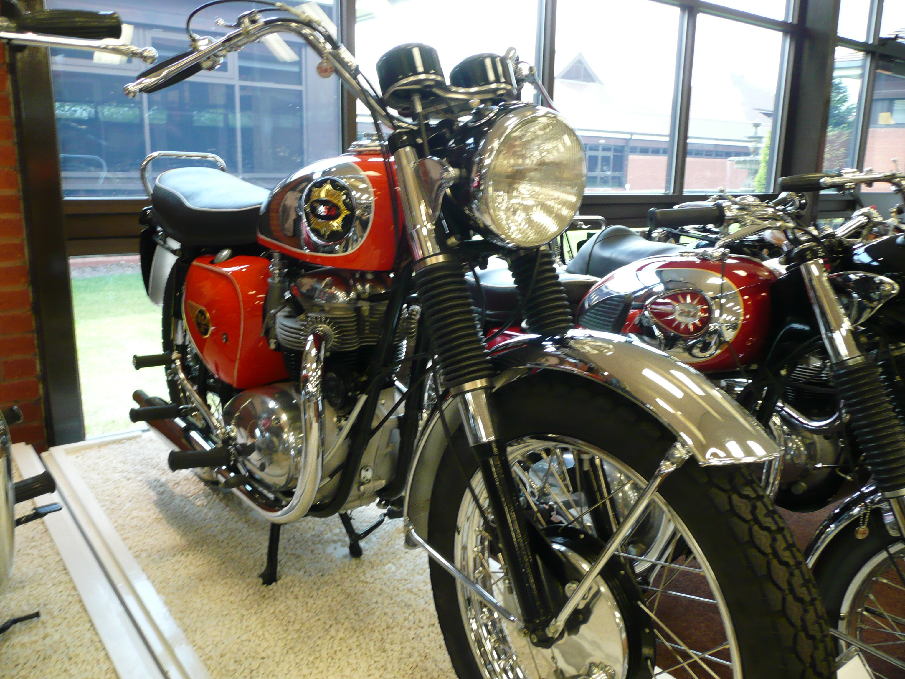 BSA Lightning Rocket 1964